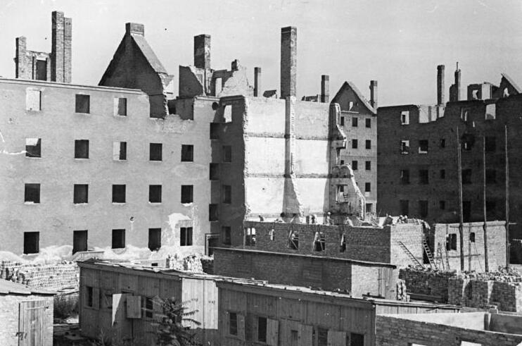 Berlin, Baustelle, Ruinen Illus Martin 12.9.51 Berlin baut auf! Die "Tote Stadt" in der Greifswalder, Kurischen, und Kniproderstrasse in Berlin wird jetzt neu aufgebaut. UBz: Blick auf eine Baustelle.